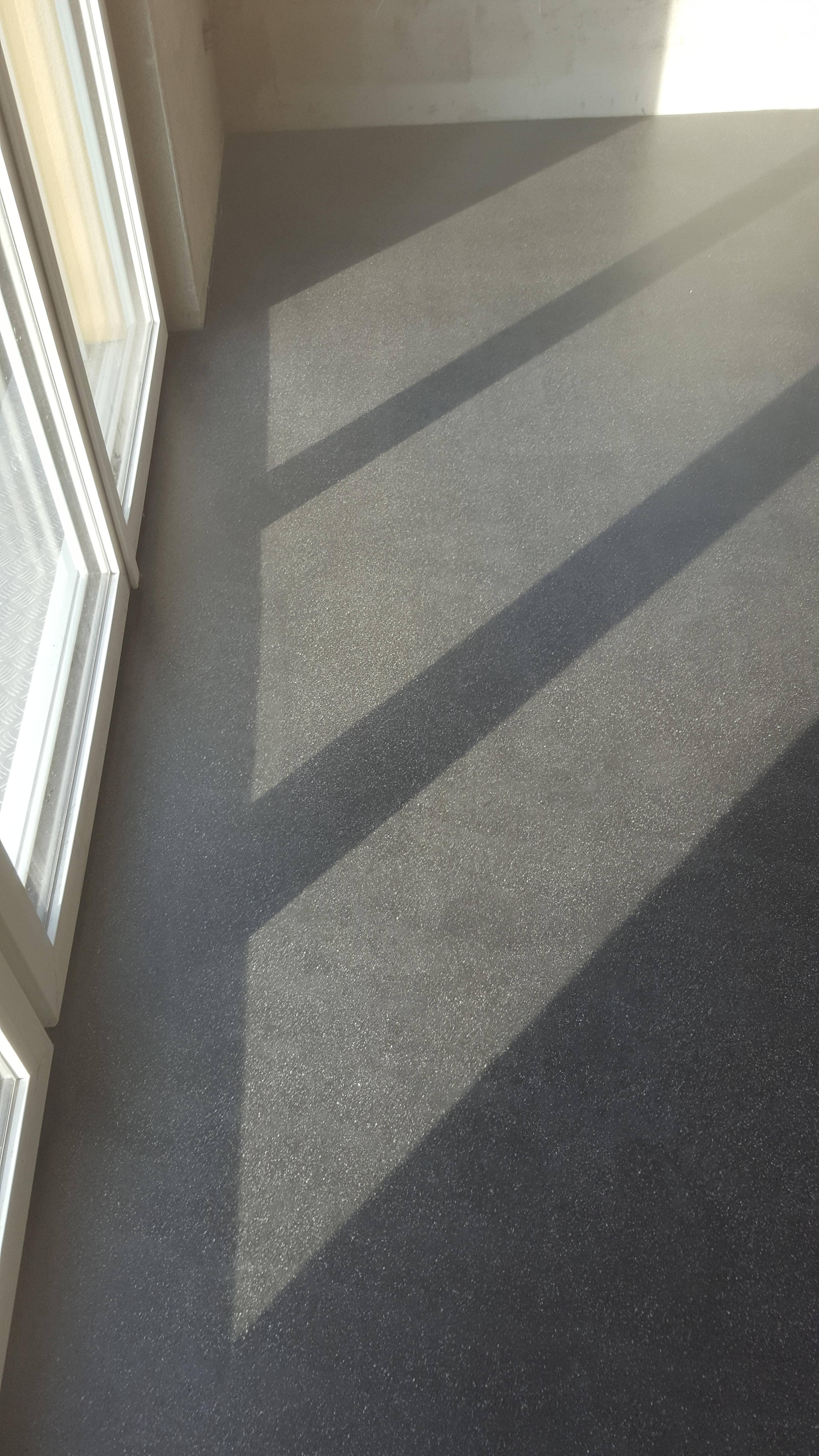 Schwarz eingefärbter Anhydritestrich aufs Korn geschliffen und versiegelt